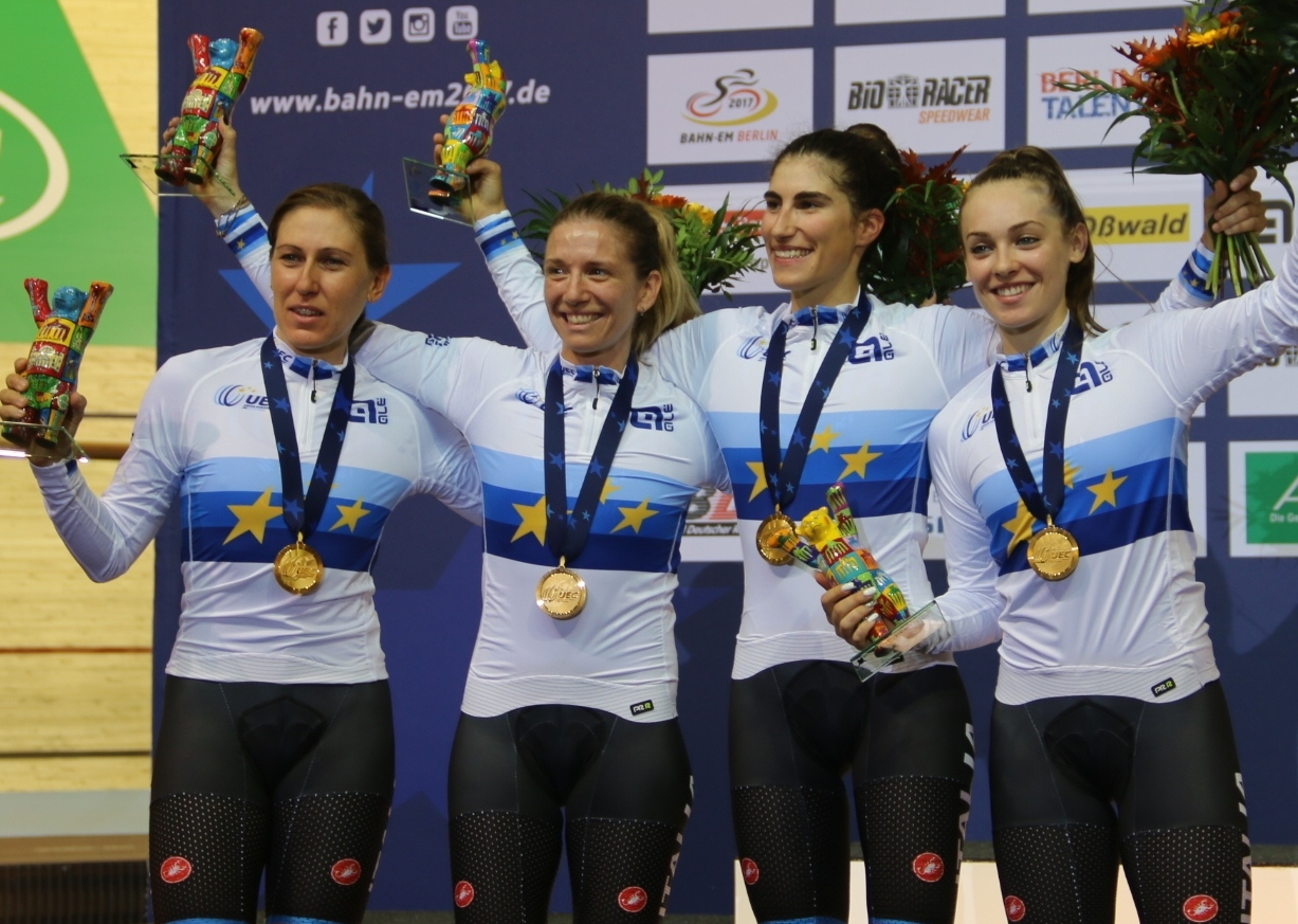 Europameisterinnen in der Mannschaftsverfolgung aus Italien, v.l.n.r.: Silvia Valsecchi, Tatiana Guderzo, Elisa Balsamo, Letizia Paternoster